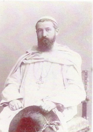 Léonce Bridoux, Père blanc (1852-1890), vicaire apostolique du Tanganyika